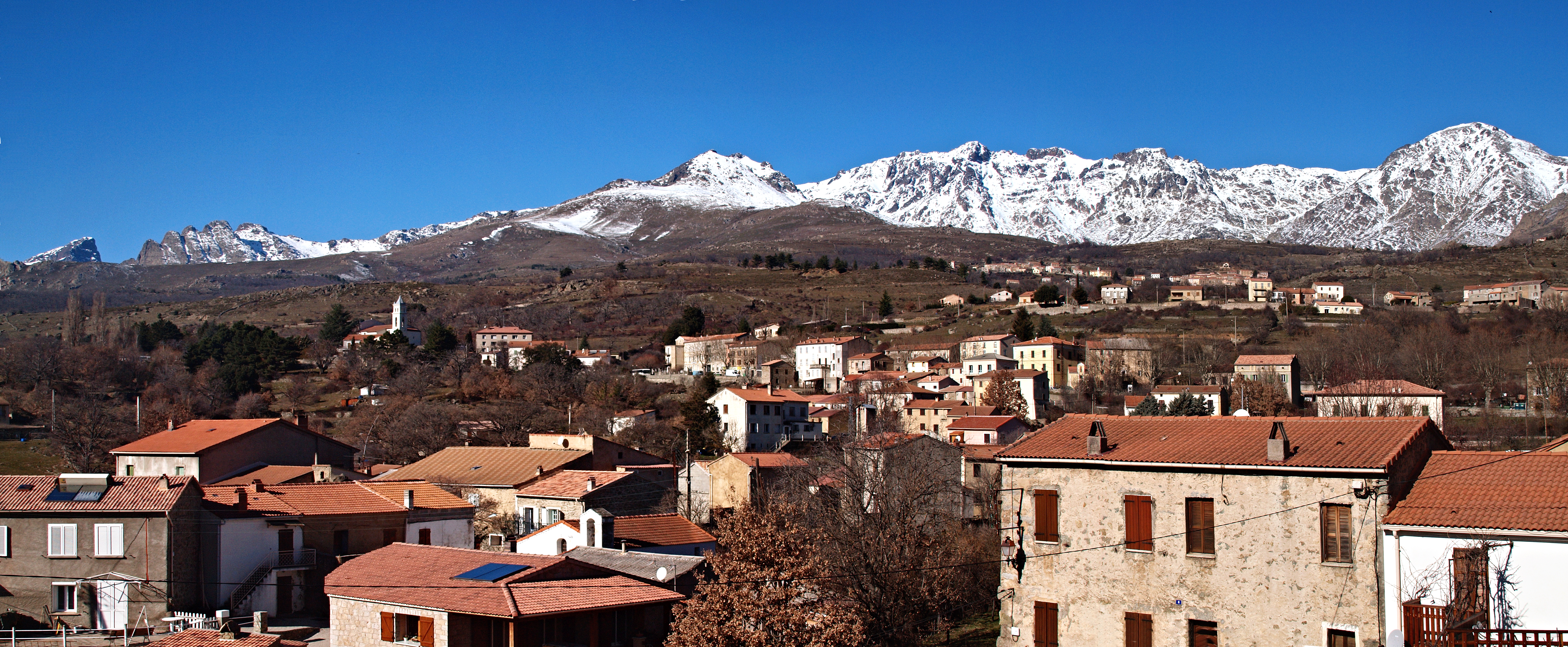 Calacuccia (Corse) - Panorama de Calacuccia